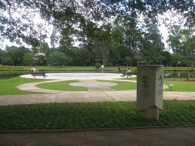 Antigo Heliponto Municipal Demoiselle, no Parque do Ibirapuera, São Paulo, Brasil.